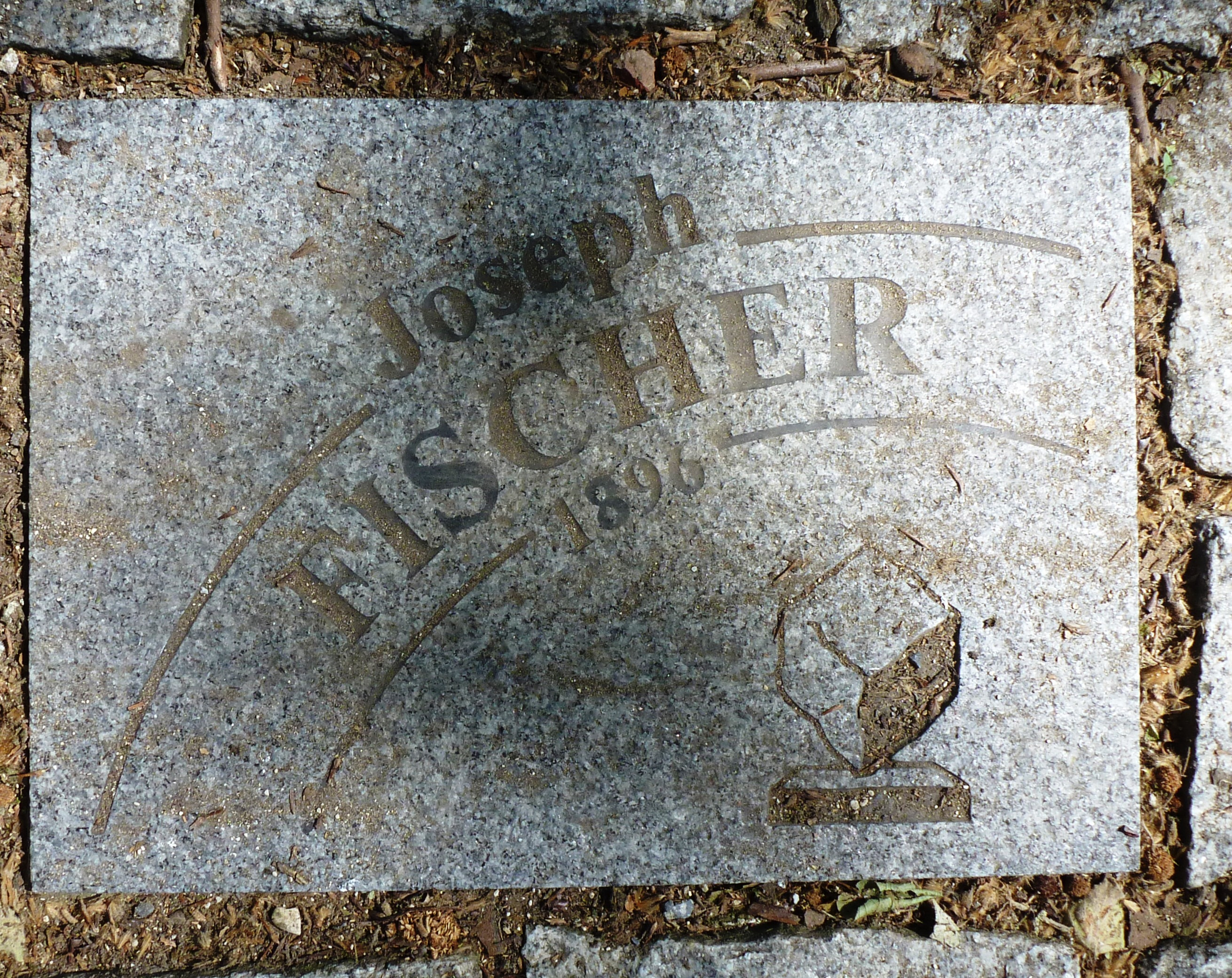 Pflasterstein für Josef (Joseph) Fischer auf der Allee Charles Crupelandt in Roubaix